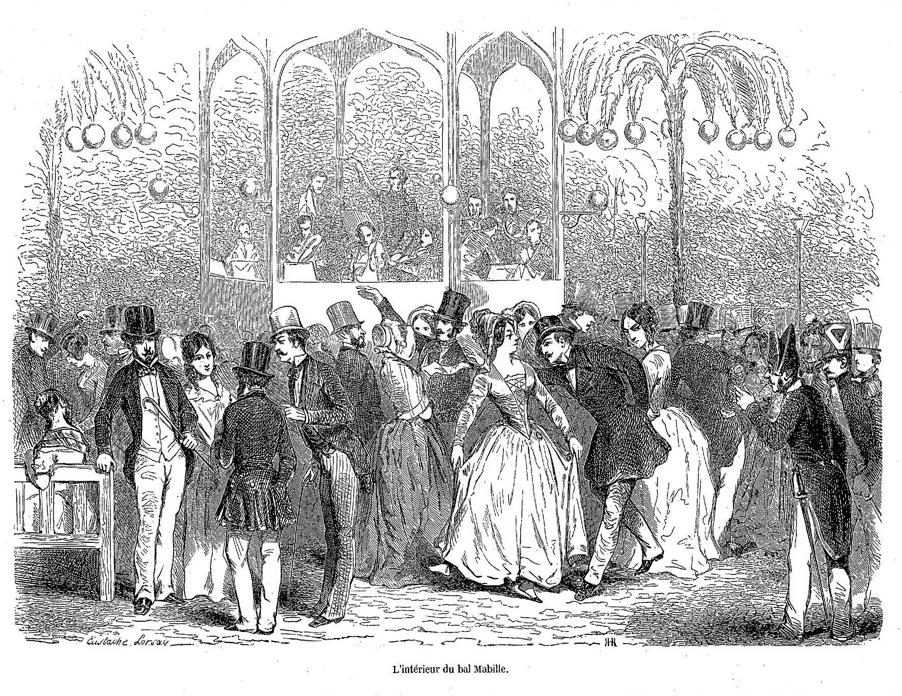 L'intérieur du bal Mabille à Paris.